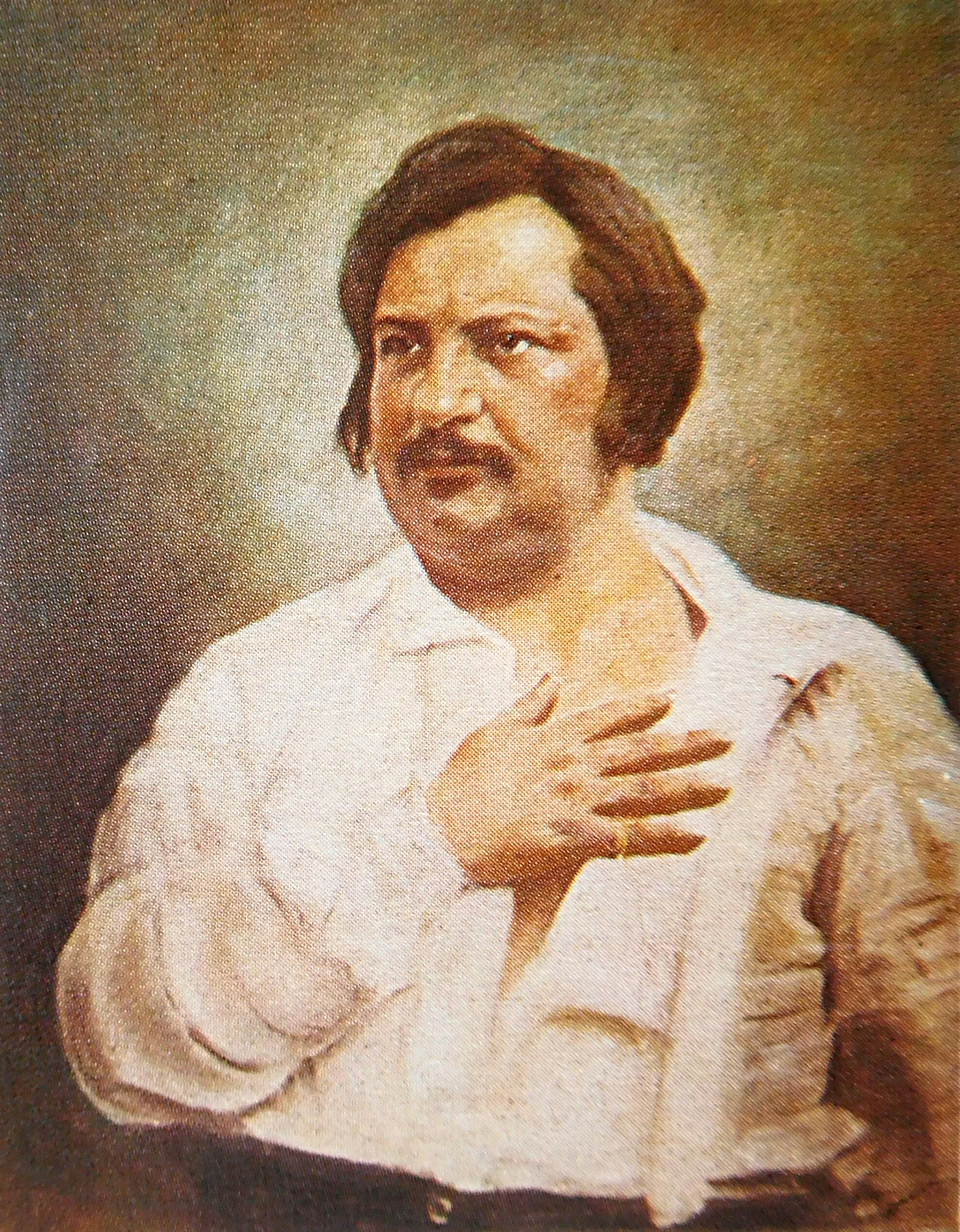 Portrait d'Honoré de Balzac